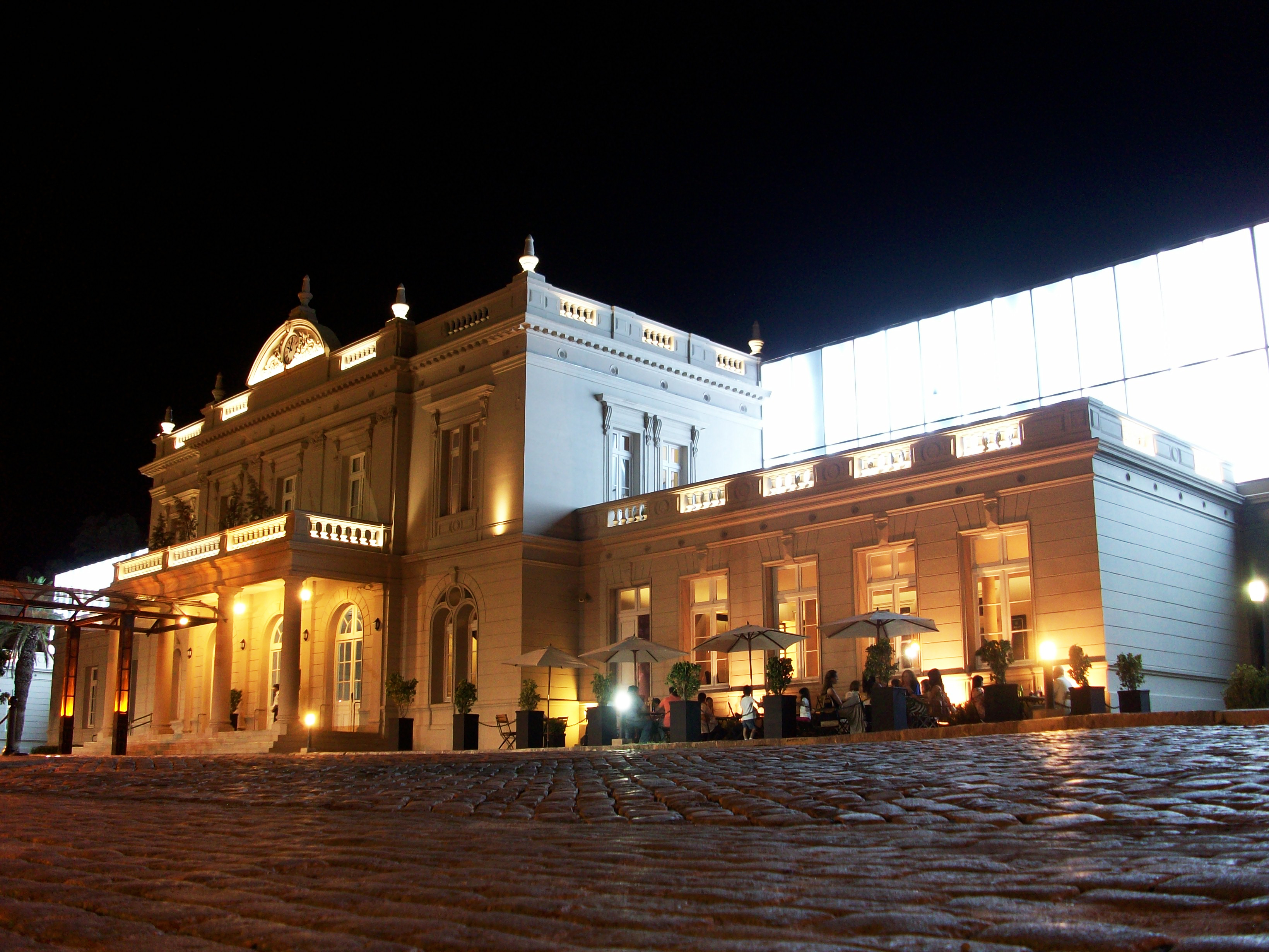 La fachada principal del Forum de Santiago del Estero de noche